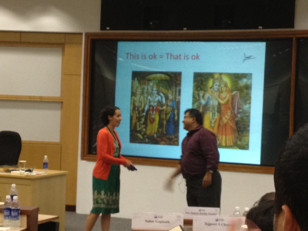 Soulaima Gourani at class in The Indian School of Business